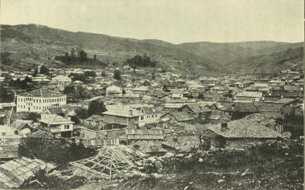 Imagen de Batak.